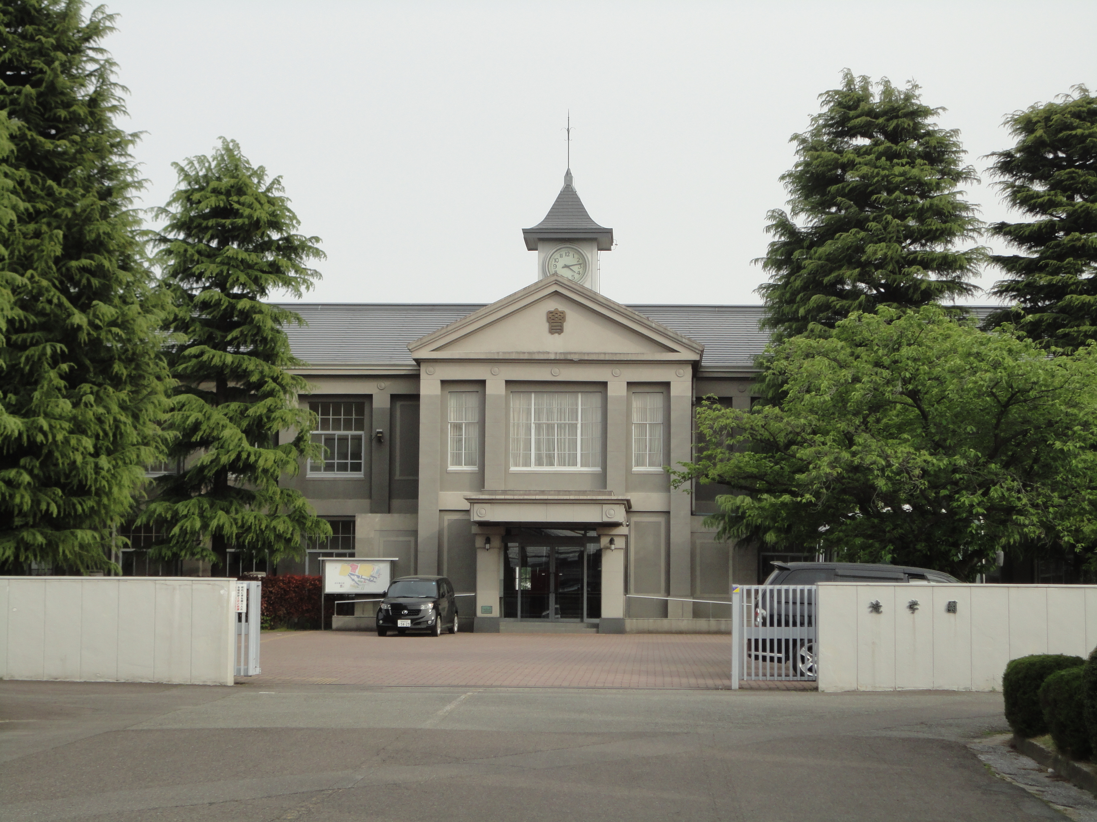 愛知県江南市の滝中学校・高等学校